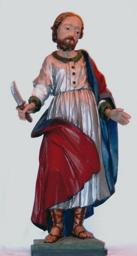 Hl. Bartholomäus